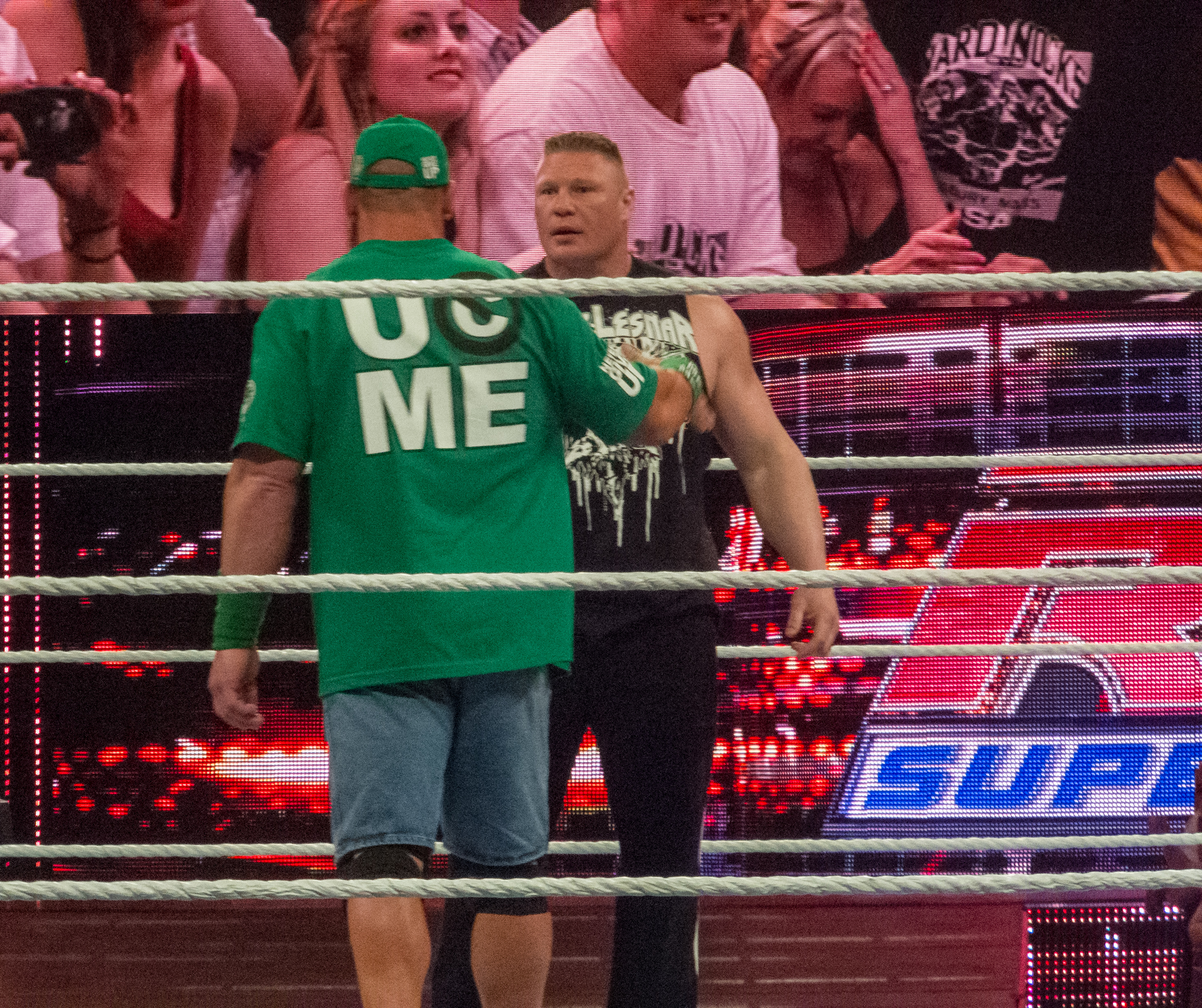 WWE Post-Wrestlemania 28 RAW